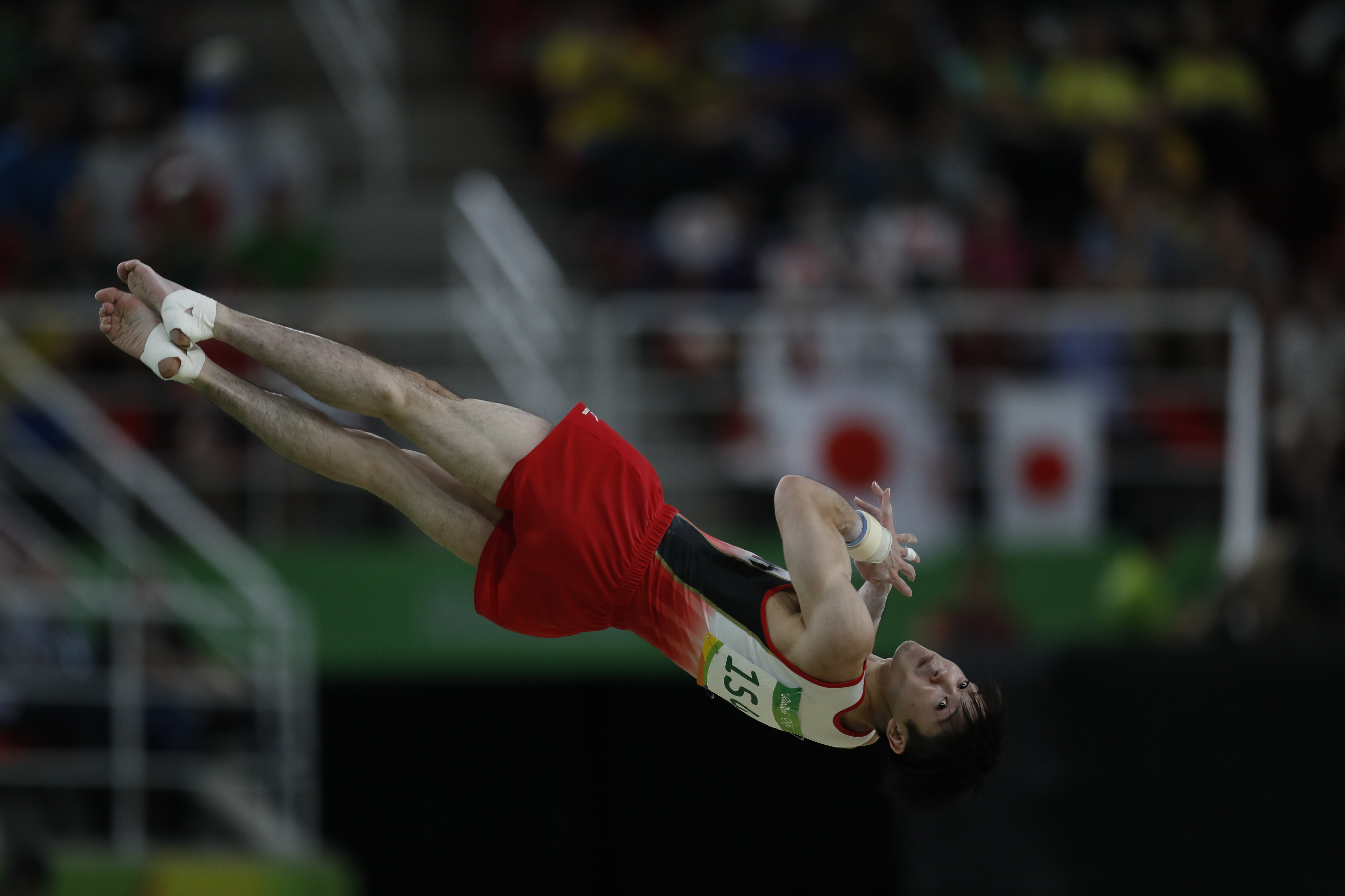 Rio de Janeiro - Kohei Uchimura durante exercício de solo em que o Japão levou medalha de ouro na ginástica artística por equipes no masculino nos Jogos Olímpicos Rio 2016 (Fernando Frazão/Agência Brasil)